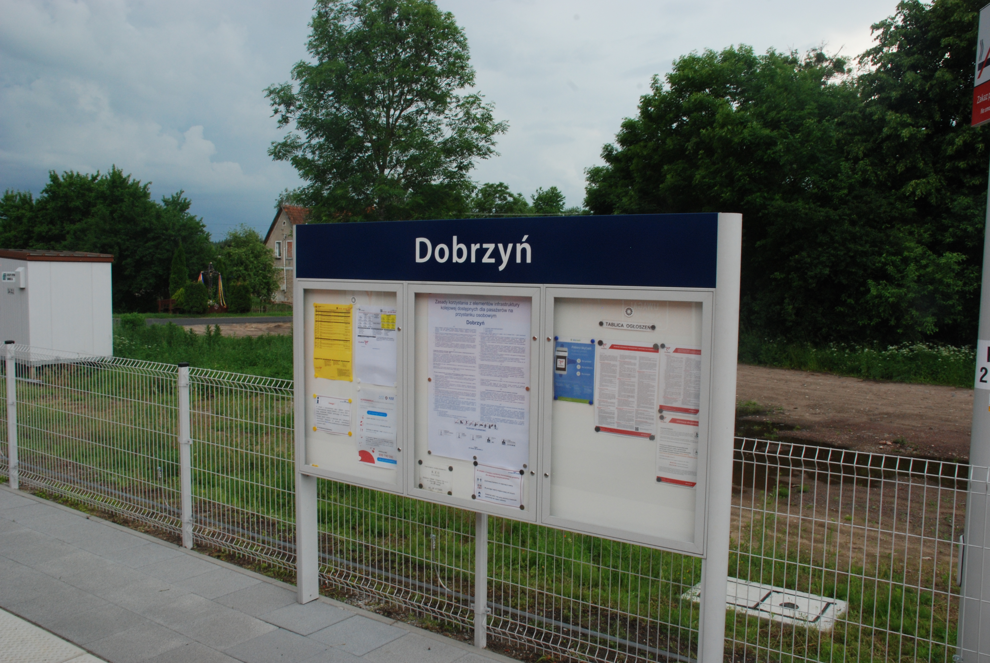 Widok na tablicę peronową na przystanku kolejowym Dobrzyń.